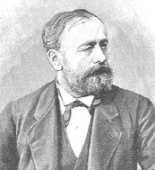 Ammiraglio e uomo politico italiano, ministro e senatore del Regno d'Italia